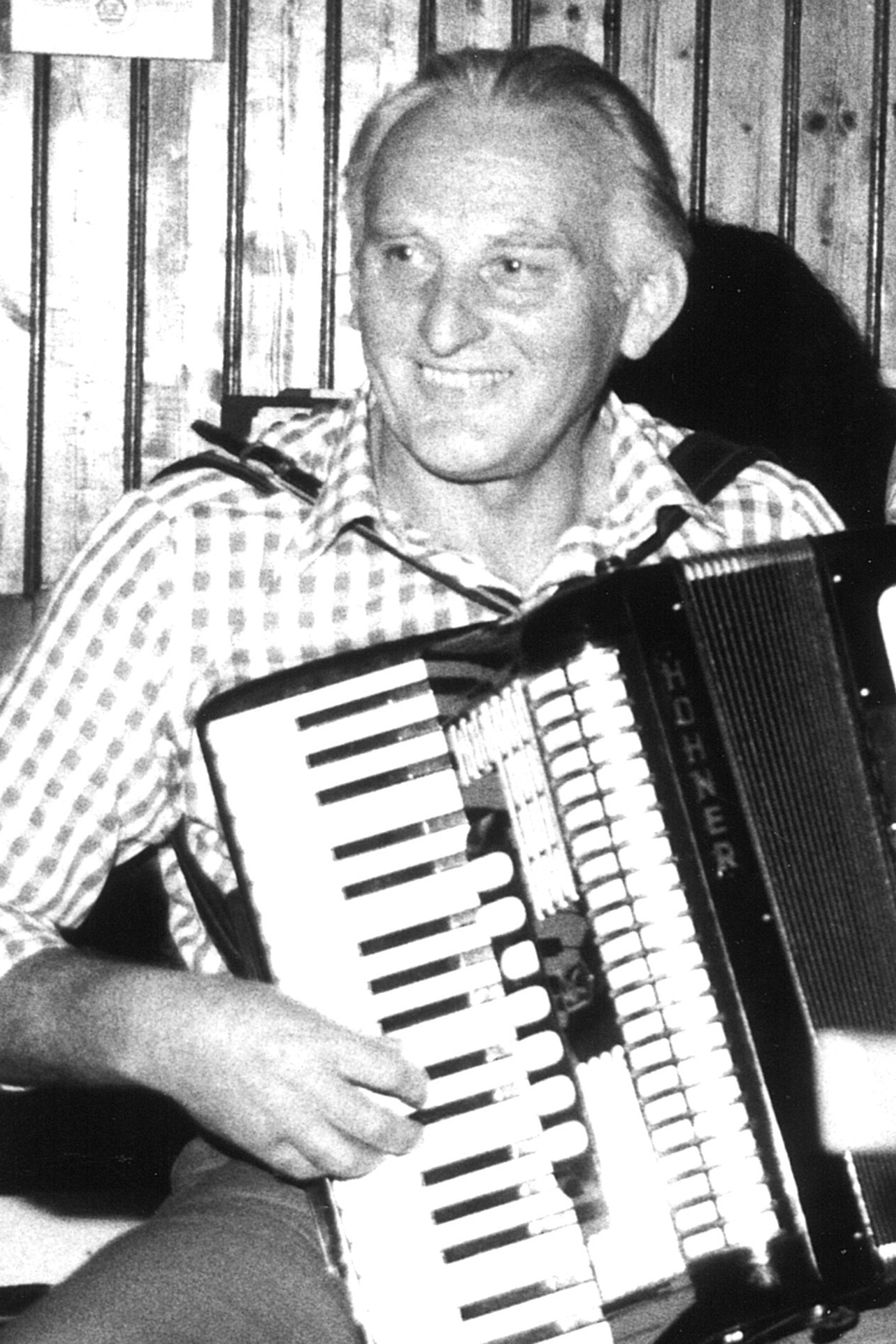 Herbert "Enzo" Schildbach bringt jede Runde in Stimmung